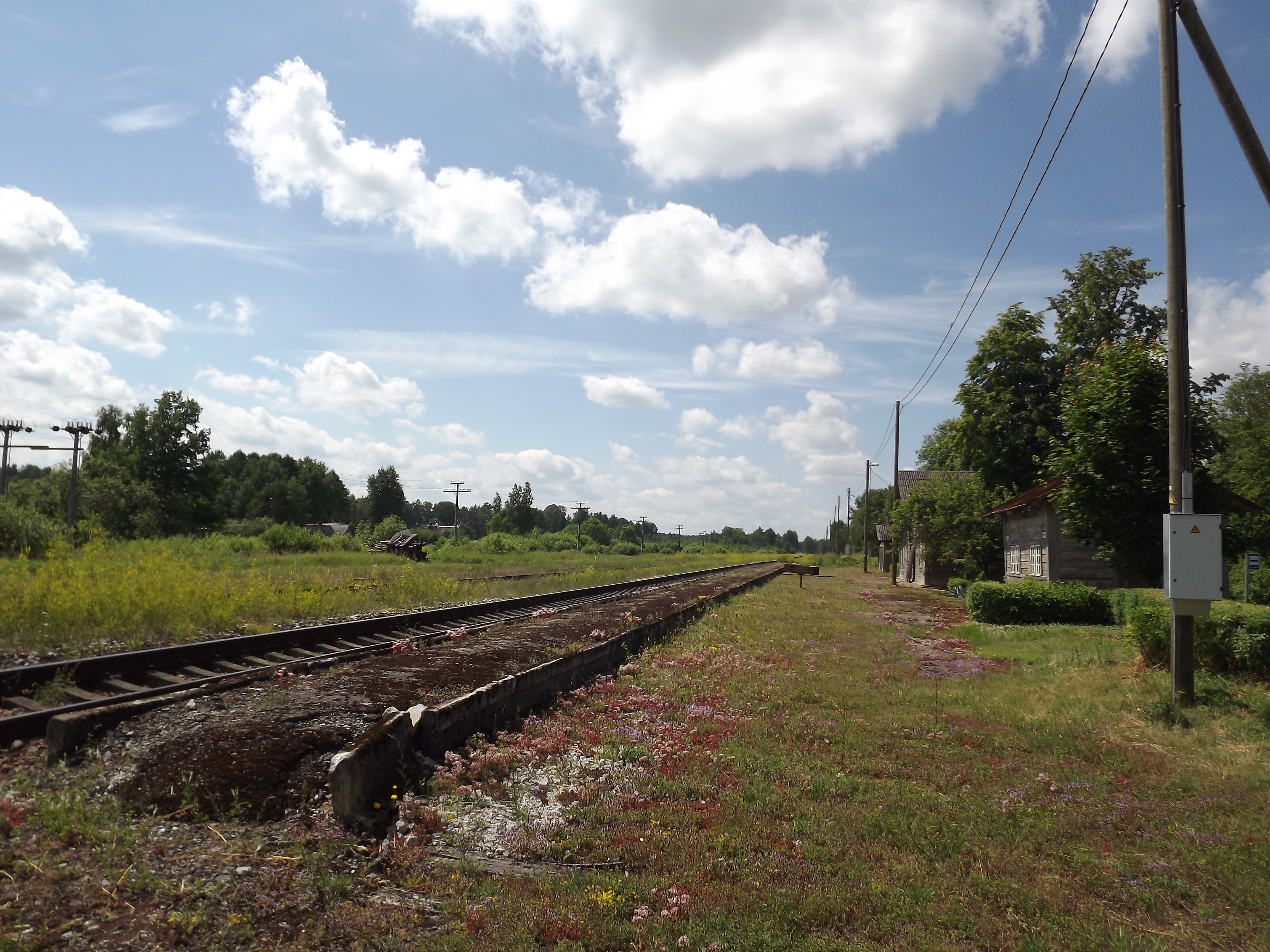 Perroon